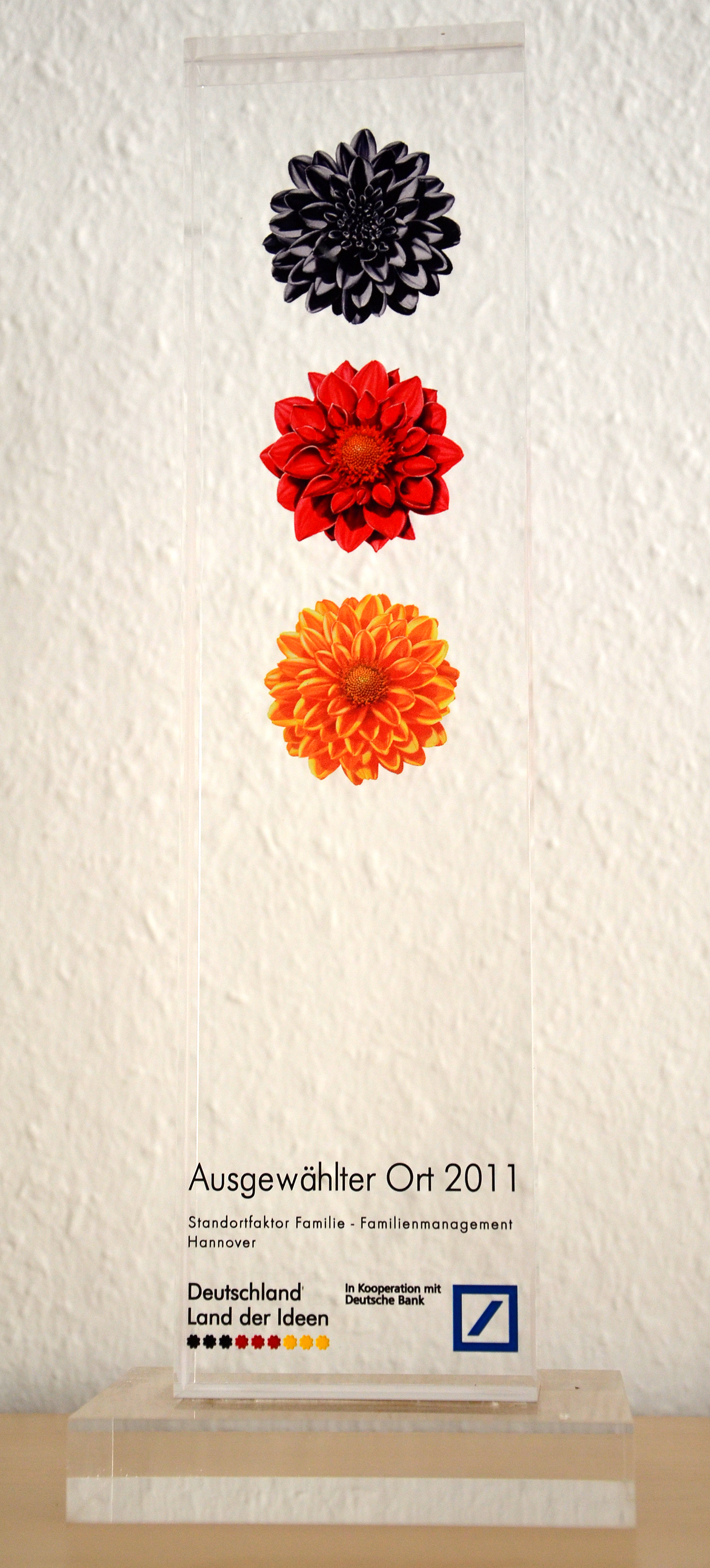 Zusätzlich zu einer Plakette erhielt das Familienmanagement der Landeshauptstadt Hannover einen „Pokal“ mit der Aufschrift „Ausgewählter Ort 2011 / Standortfaktor Familie ...“ von der Initiative Deutschland – Land der Ideen in Kooperation mit Deutsche Bank. Die ansonsten schmucklose, glasklare Standfigur ist mit drei Dahlienblüten in den Farben der Flagge der Bundesrepublik Schwarz-Rot-Gold ...